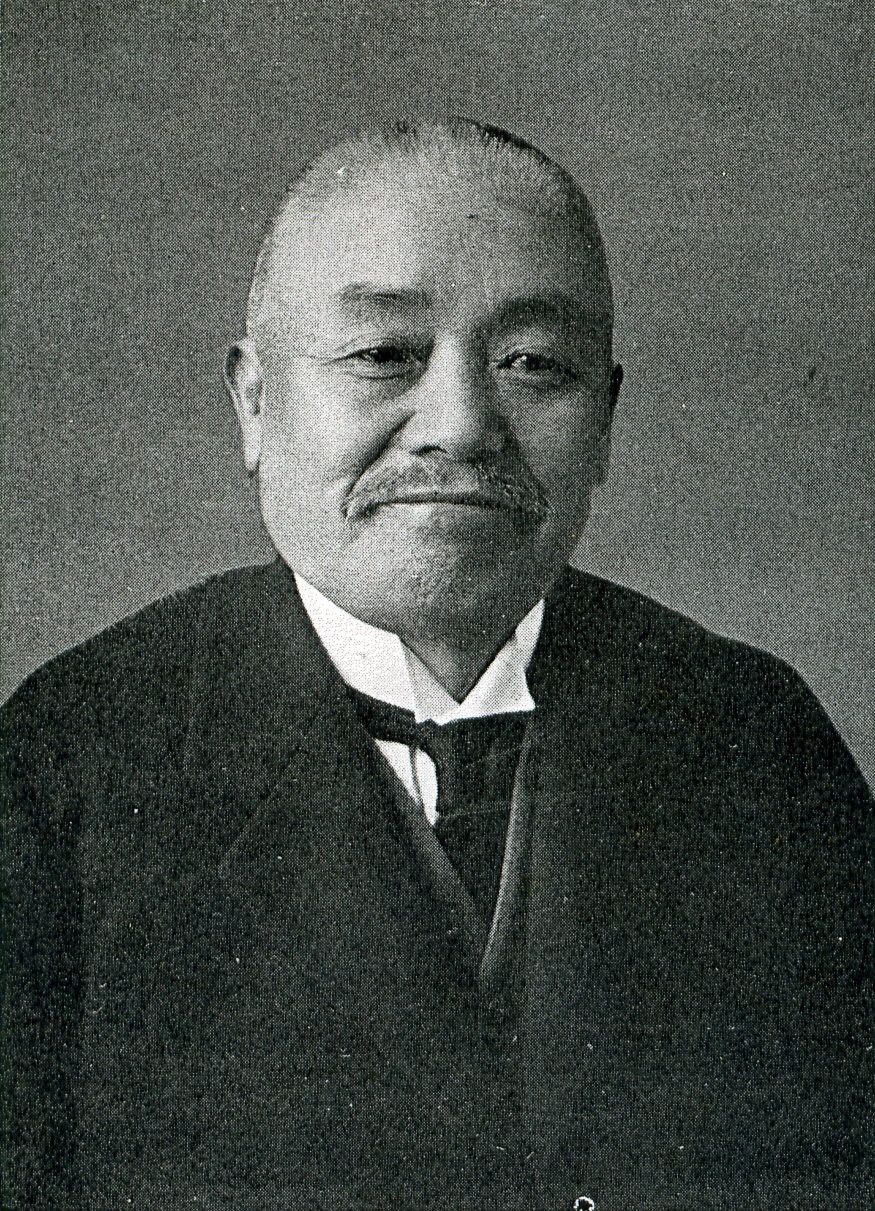 この写真は、鈴木梅四郎（1862-1940）の写真です。